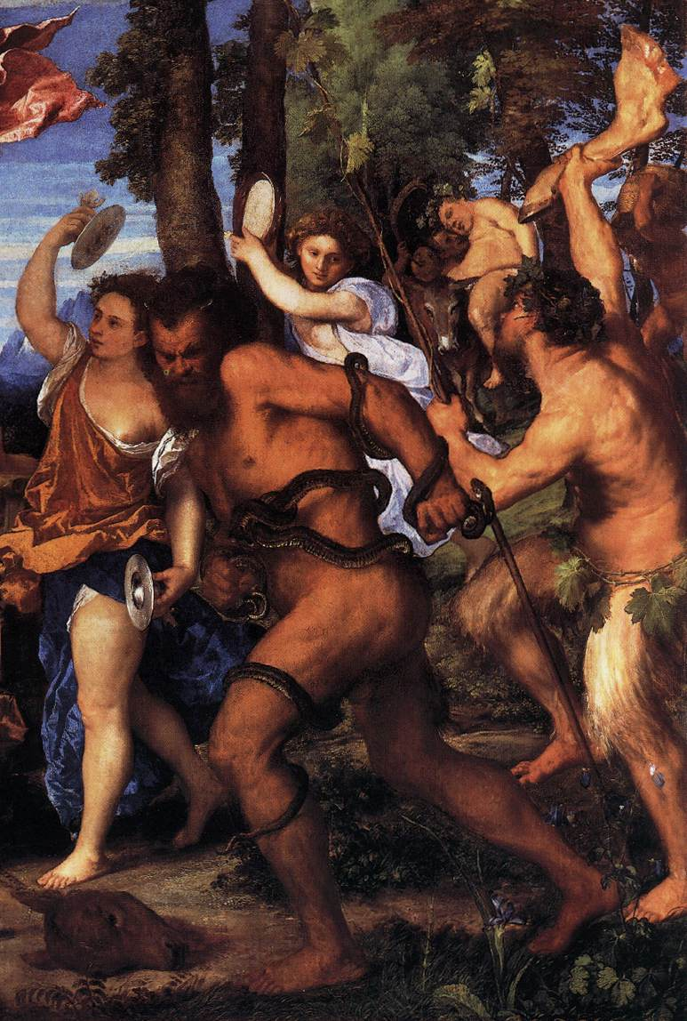 detail